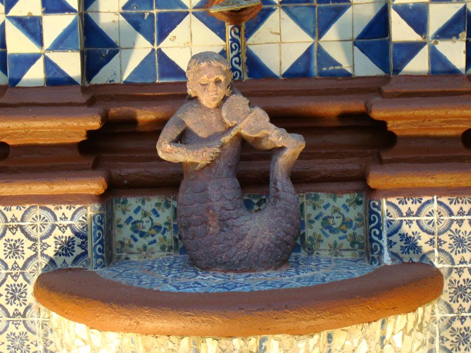 Sirena Decorativa como elemnto acuatico de la Fuente de la Casa del Risco